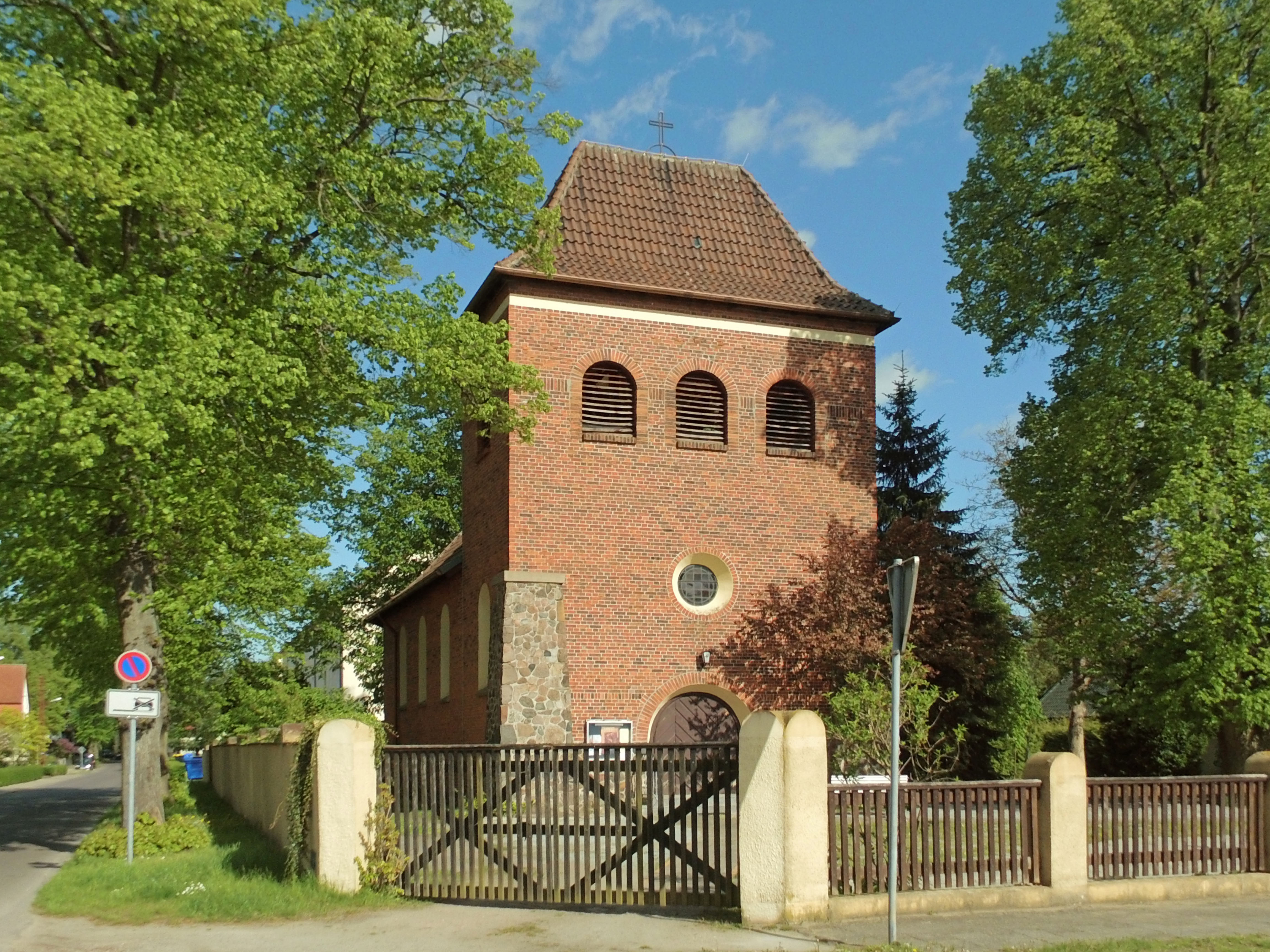 Römisch-katholische St.-Johannes-Baptist-Kirche in Seehausen (Landkreis Stendal)